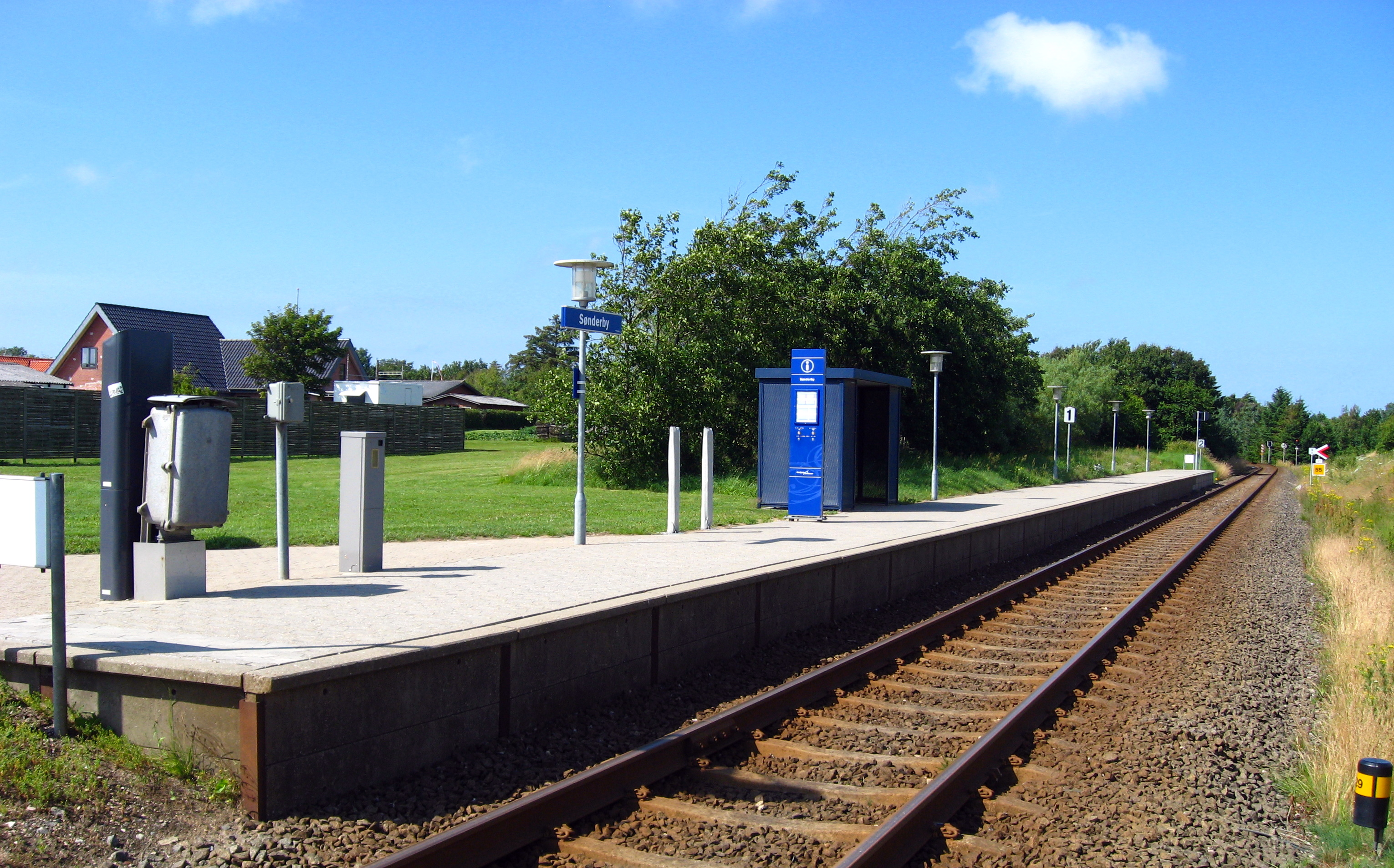 Sønderby Trinbræt er en dansk jernbanestation i det sydlige Tornby, mellem Hjørring og Hirtshals, mellem Vidstrup Station og Tornby Station.